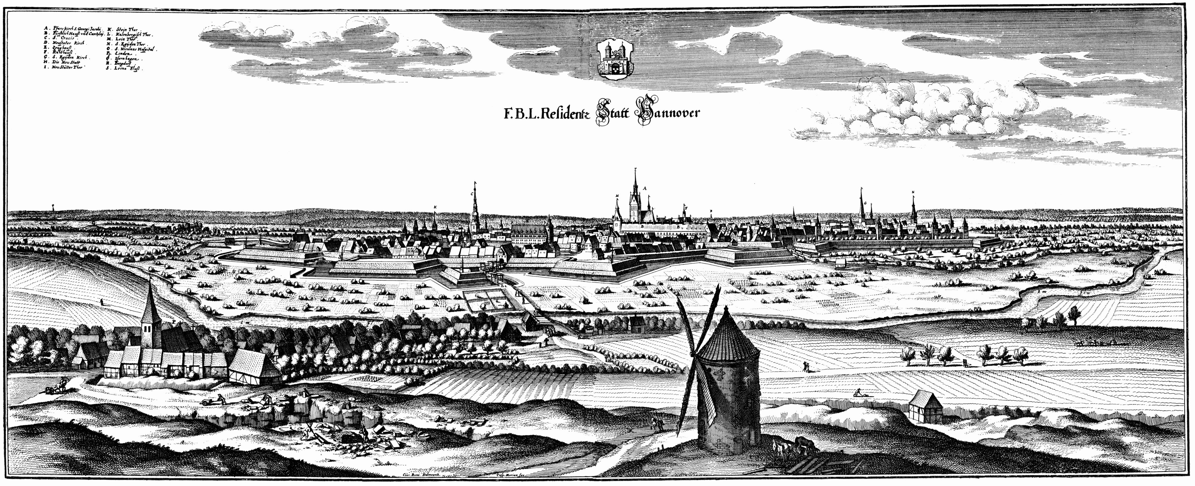 Kupferstich von 1654 mit dem Titel „F. B. L. ((Kur-)Ffürstentum Braunschweig-Lüneburg) Residenz Stadt Hannover“, im Bildvordergrund das Dorf links Linden mit der wohl ältesten bekannten Darstellung der Ihmebrücke, In der Bildmitte vorne die Mühle auf dem Lindener Berg. Die Künstlersignaturen am unteren Bildrand lauten „Conr. Buno delineavit, Casp Merian fec.“ ...